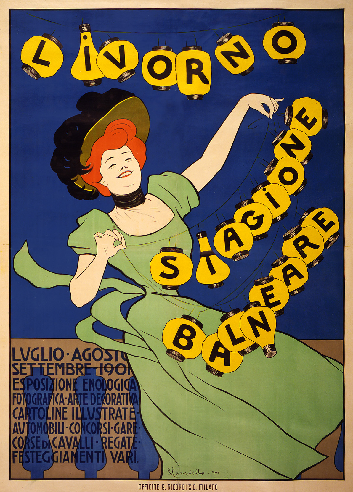 Livorno stagione balneare. Luglio Agosto Settembre 1901. Esposizione enologica, fotografica, arte decorativa, cartoline illustrate, automobili, concorsi, gare, corse di cavalli, regate, festeggiamenti vari. Poster by Leonetto Cappiello for the Livorno resort season, and an exposition of local arts and industries, showing a woman with strings of paper lanterns.